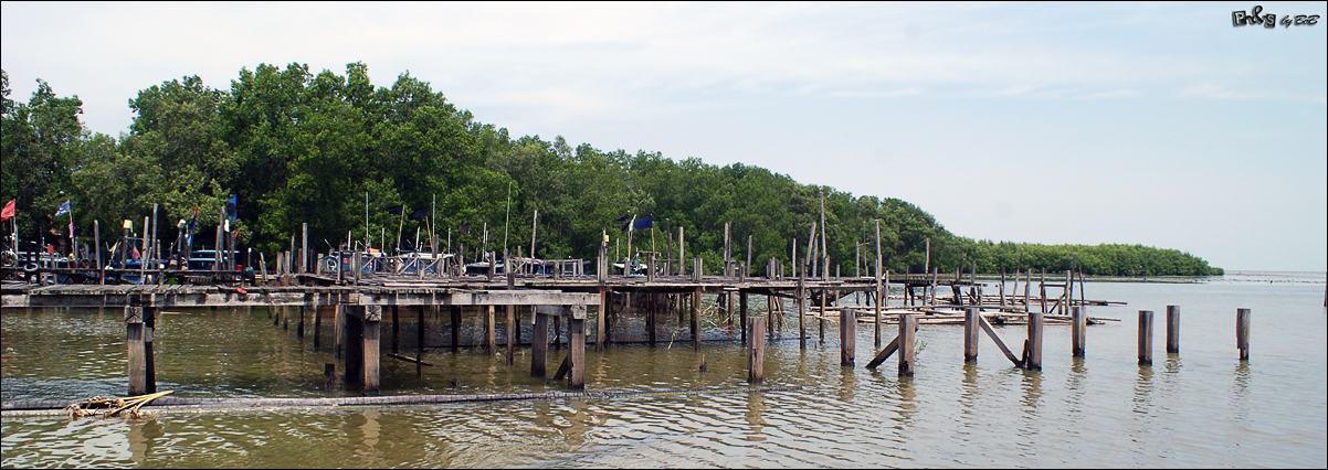 Jeti Nelayan Parit Jawa, Johor, Malaysia.